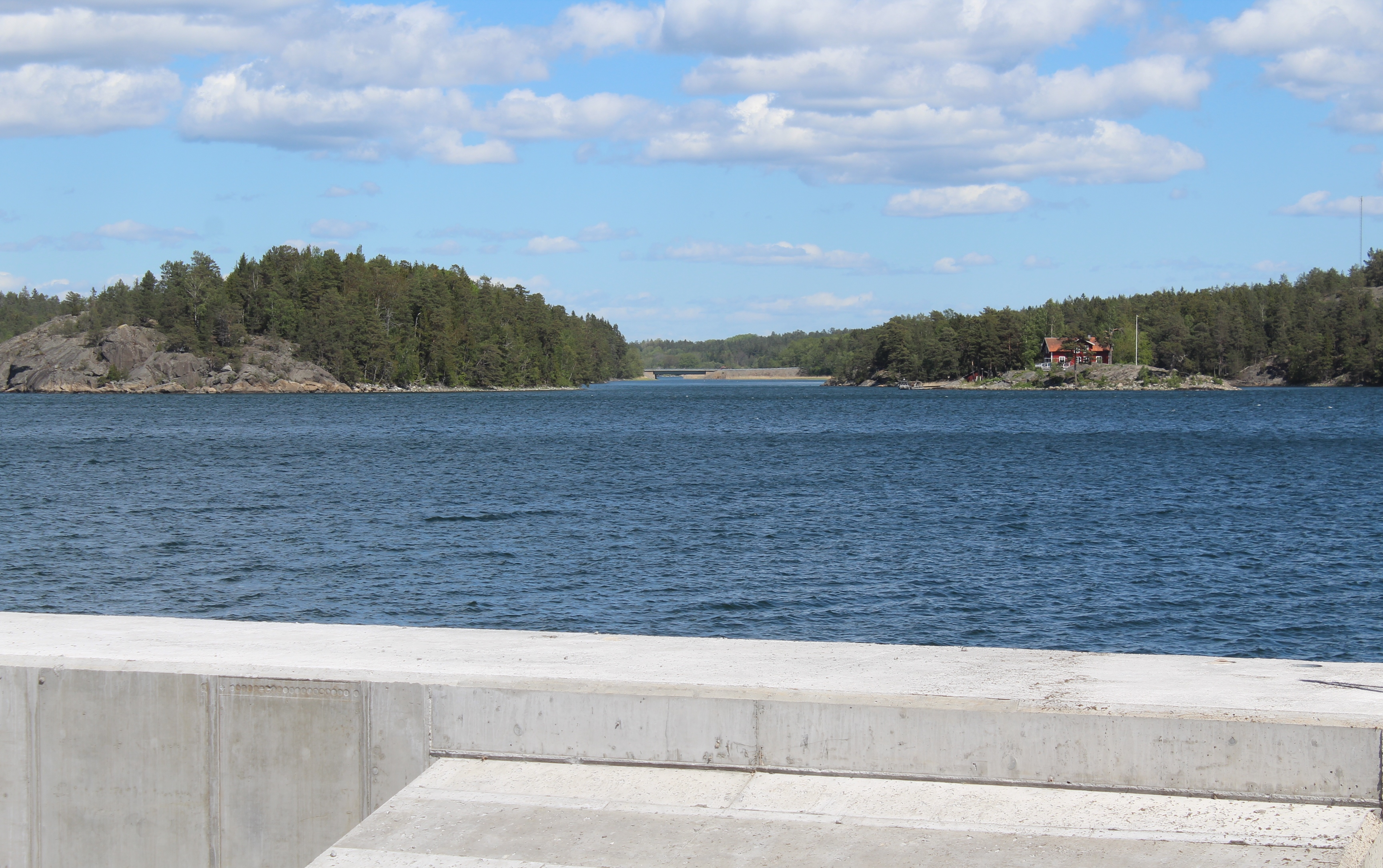 Yxlösundet, sund i Nynäshamns kommun